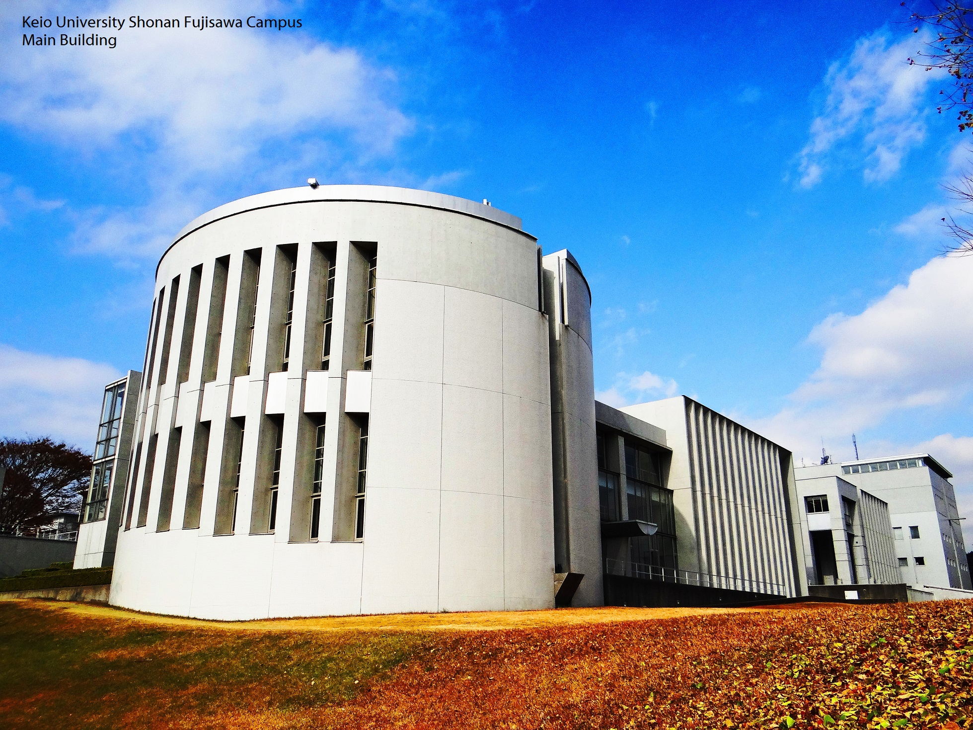 Keio University SFC Omega(East)